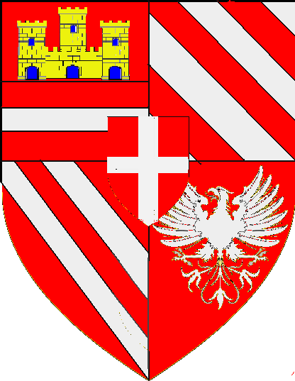 ecusson angre 1557